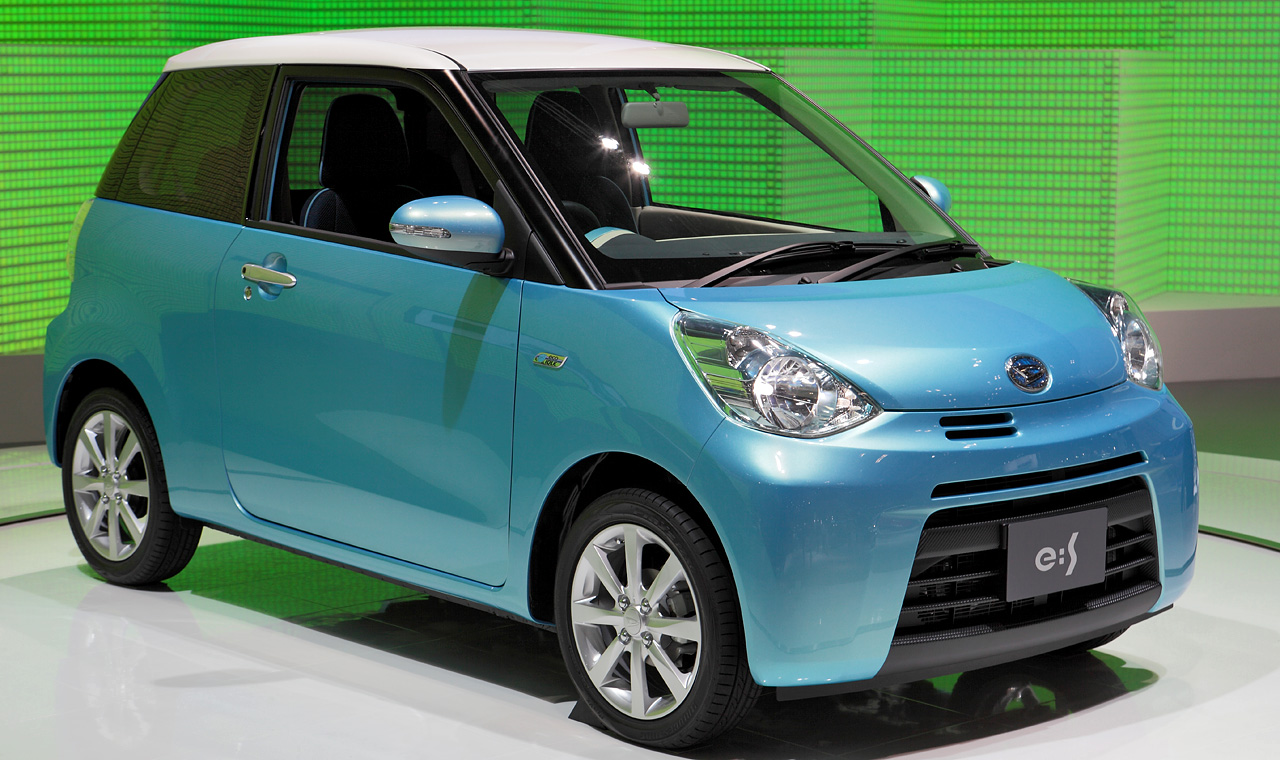 Daihatsu e:s